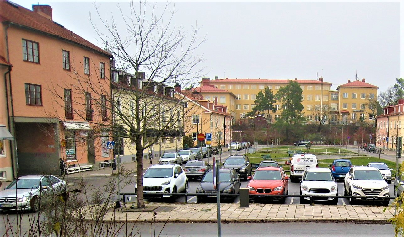 Höglandstorget, vy mot Höglandsskolan, Bromma, Stockholm.